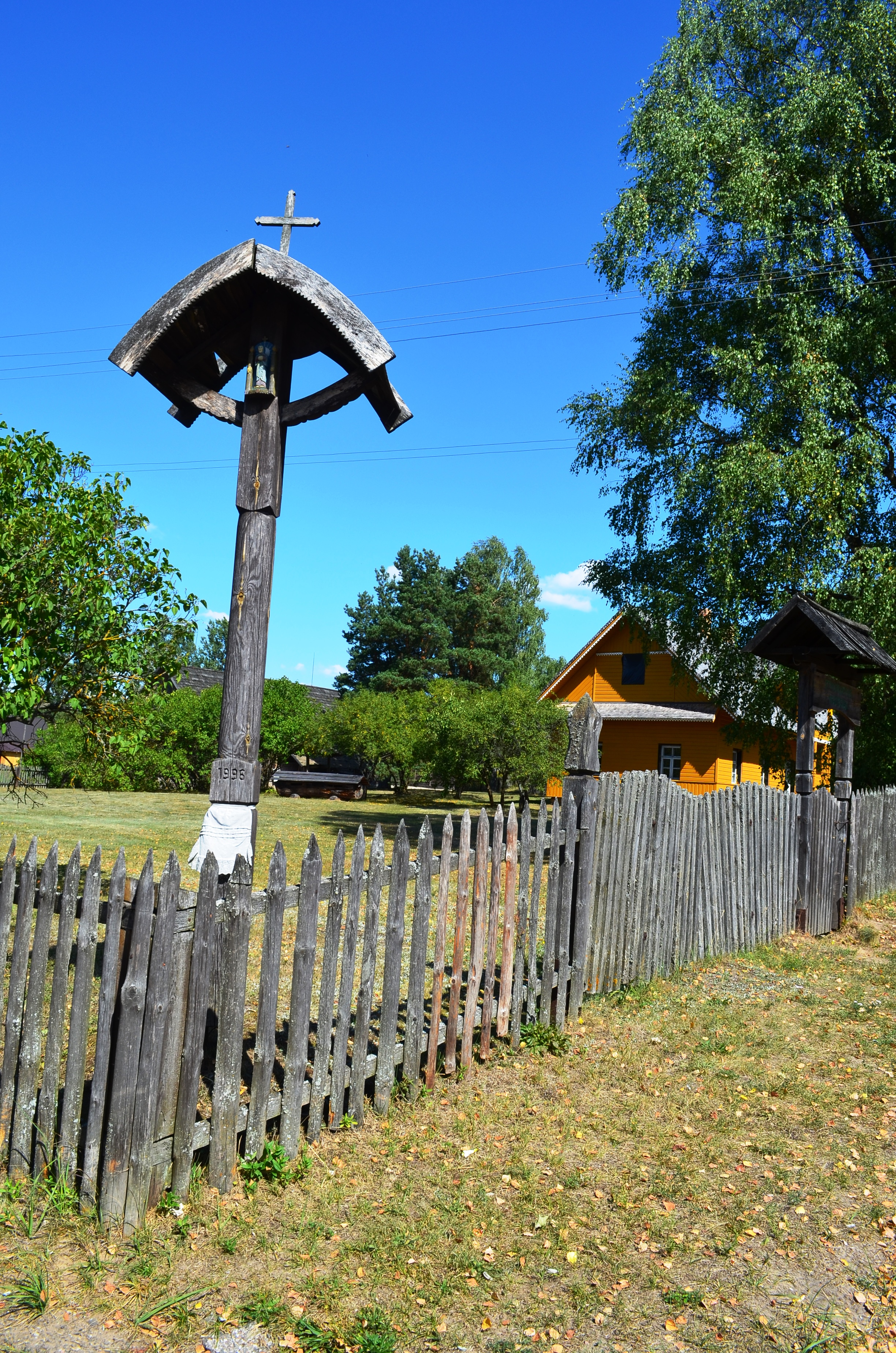 Etnografinis muziejus, Marcinkonys, Varėnos r.